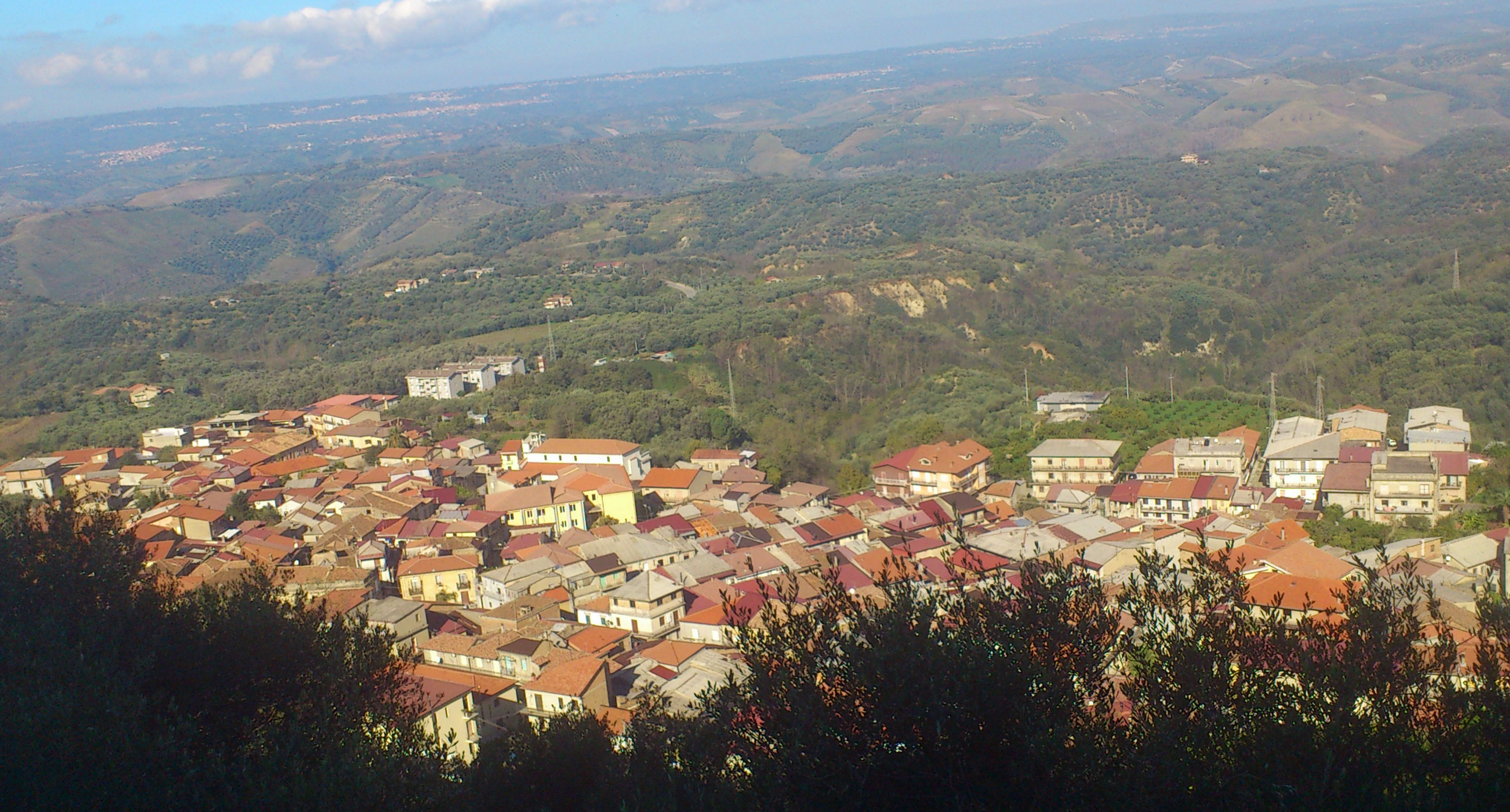 San Pietro di Caridà visto dall'alto